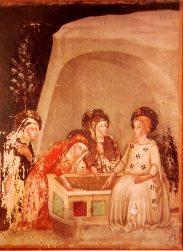 Las Santas Mujeres ante la tumba de Cristo